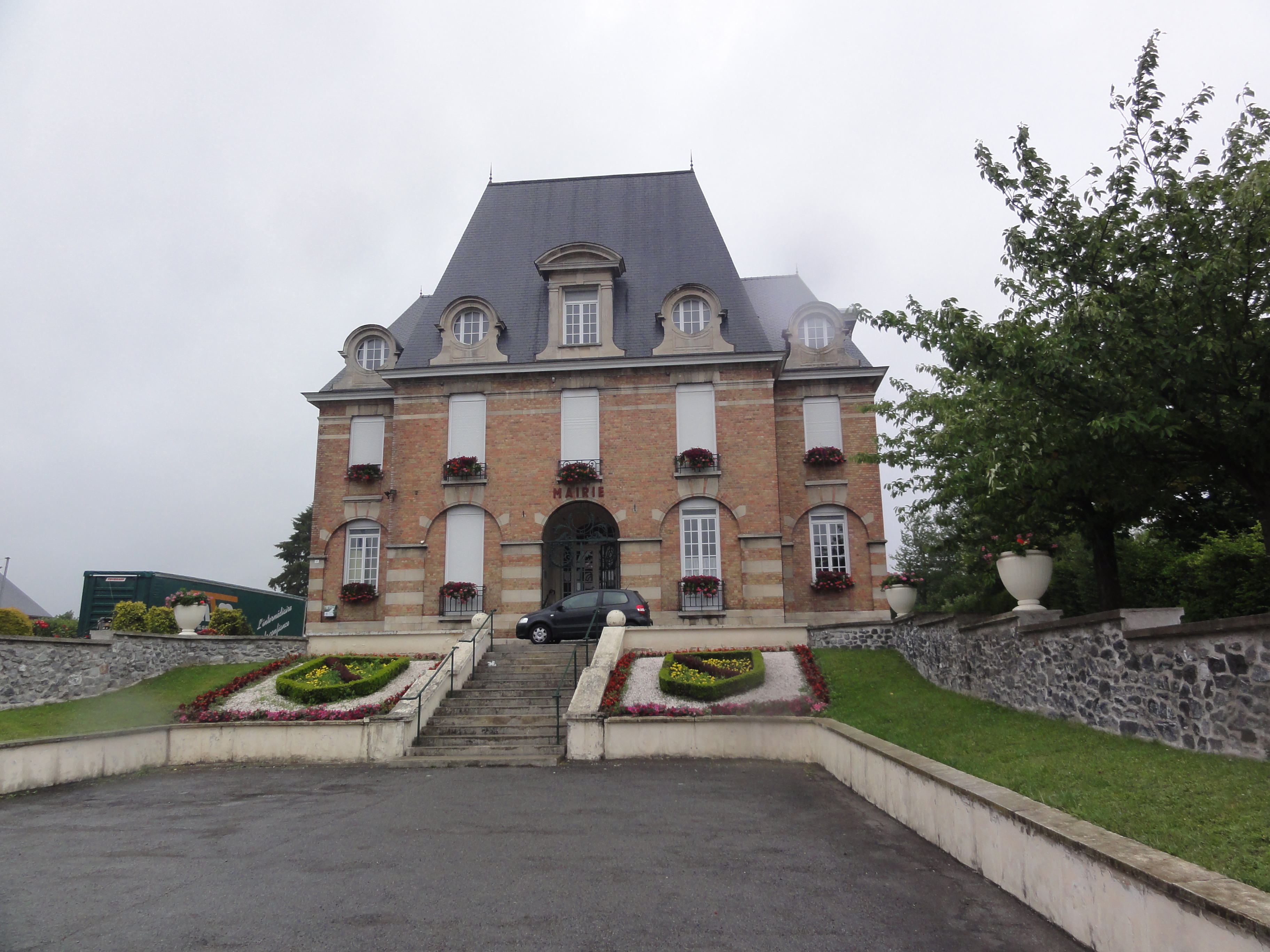 Glageon (Nord, Fr) mairie